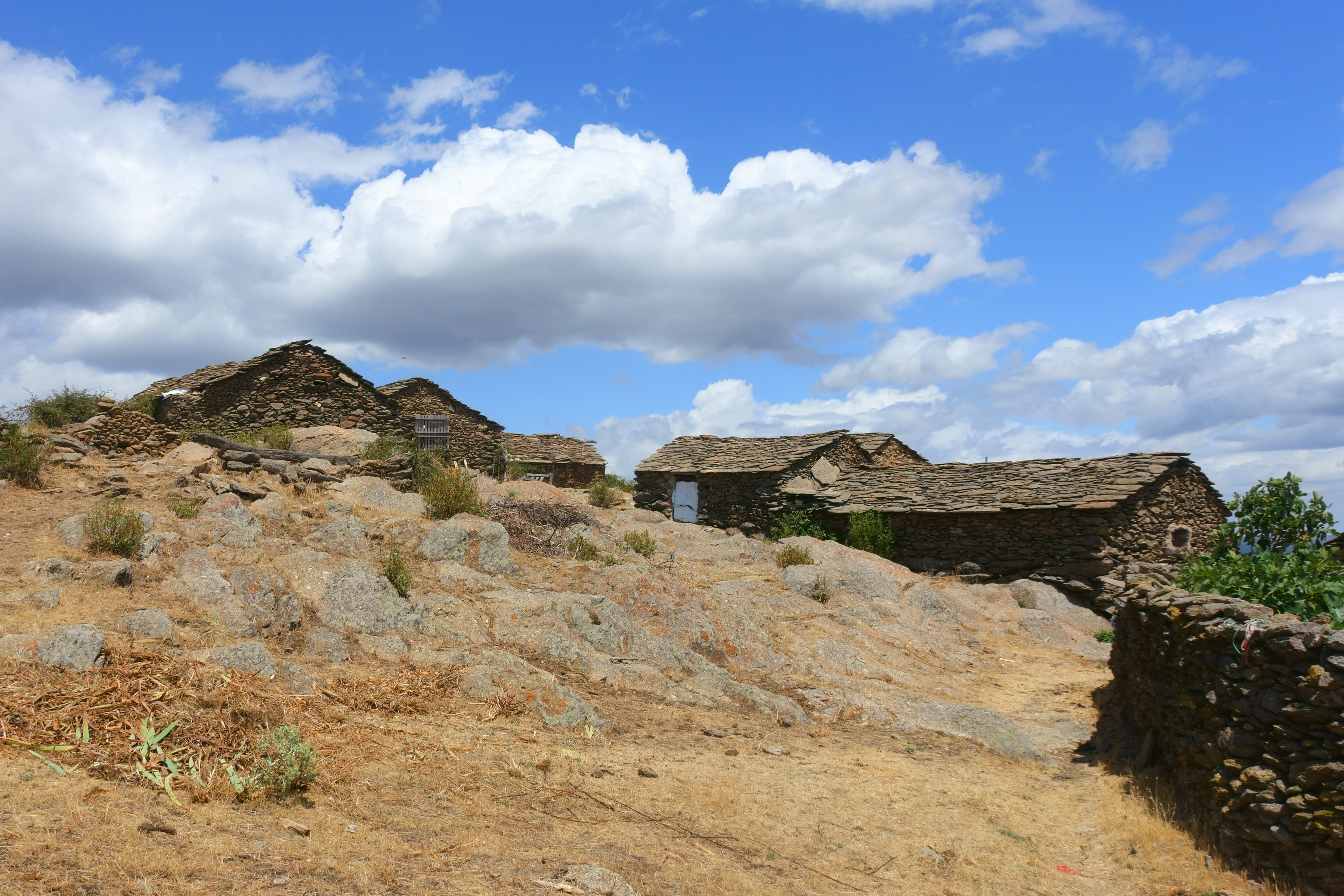 Arquitectura tradicional en Las Navas de Jadraque (Guadalajara, España).